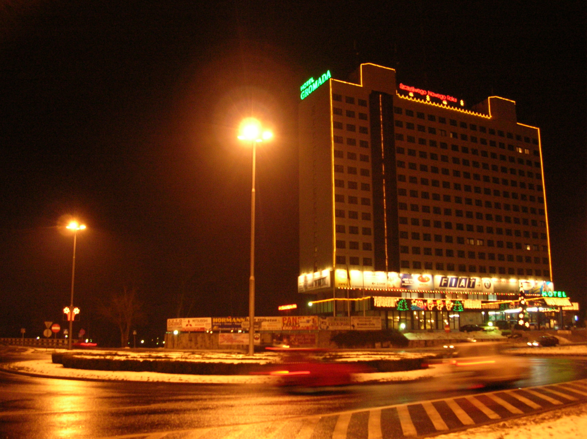 Piła - Hotel Rodło Nocą udekorowany na święta Bozego Narodzenia Autor - Bartek Wawraszko